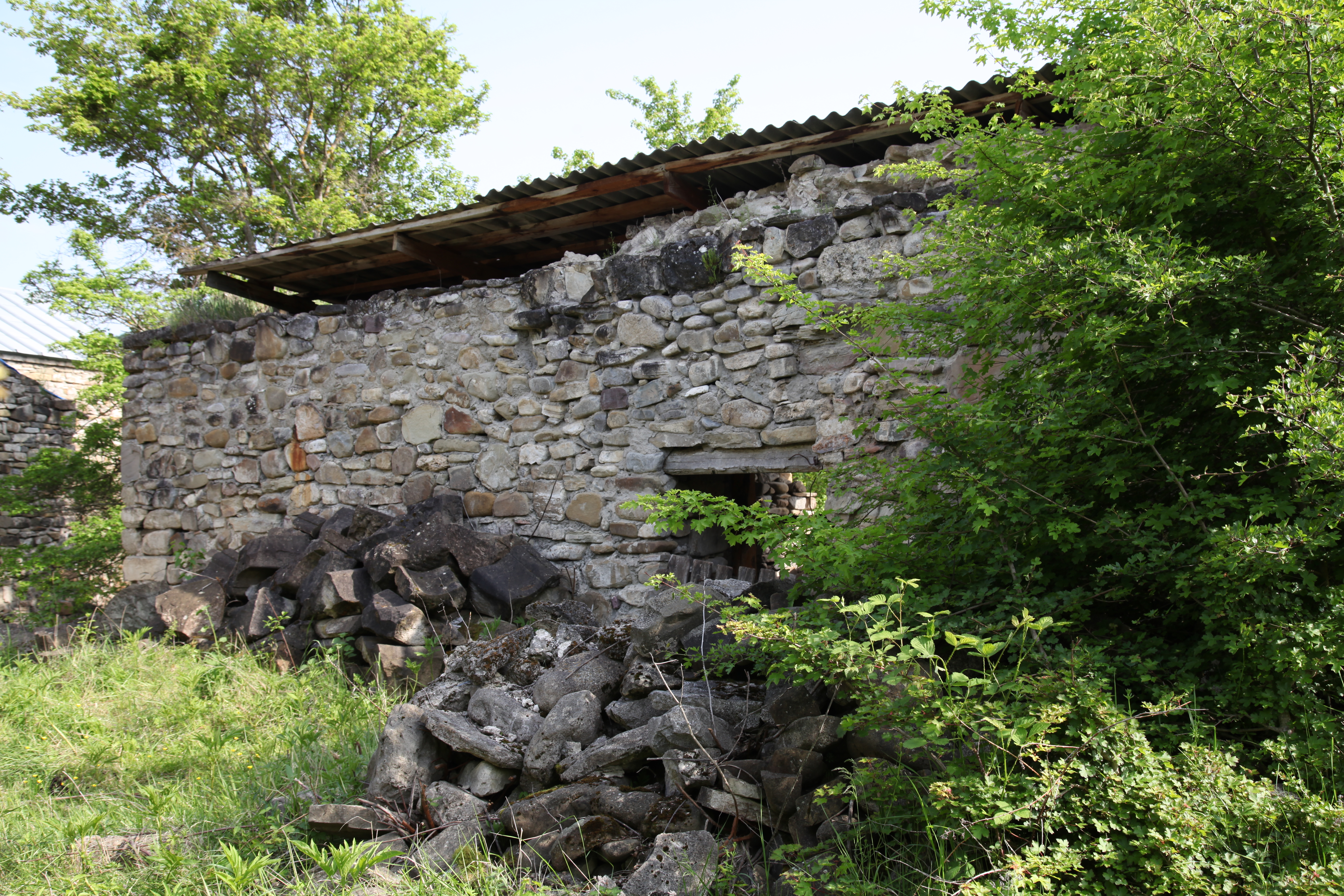 სატრაპეზო